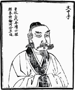 文中子·王通像